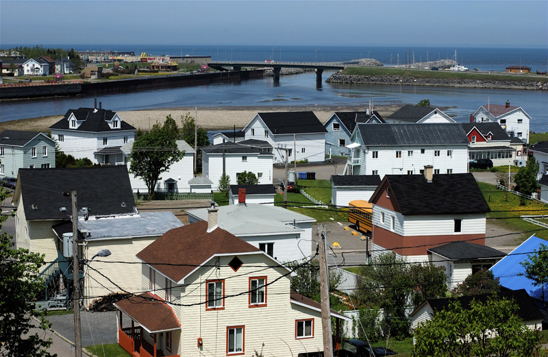 Embouchure de la rivière Matane